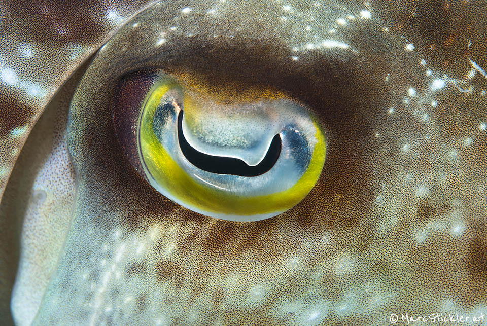 Tintenfischauge